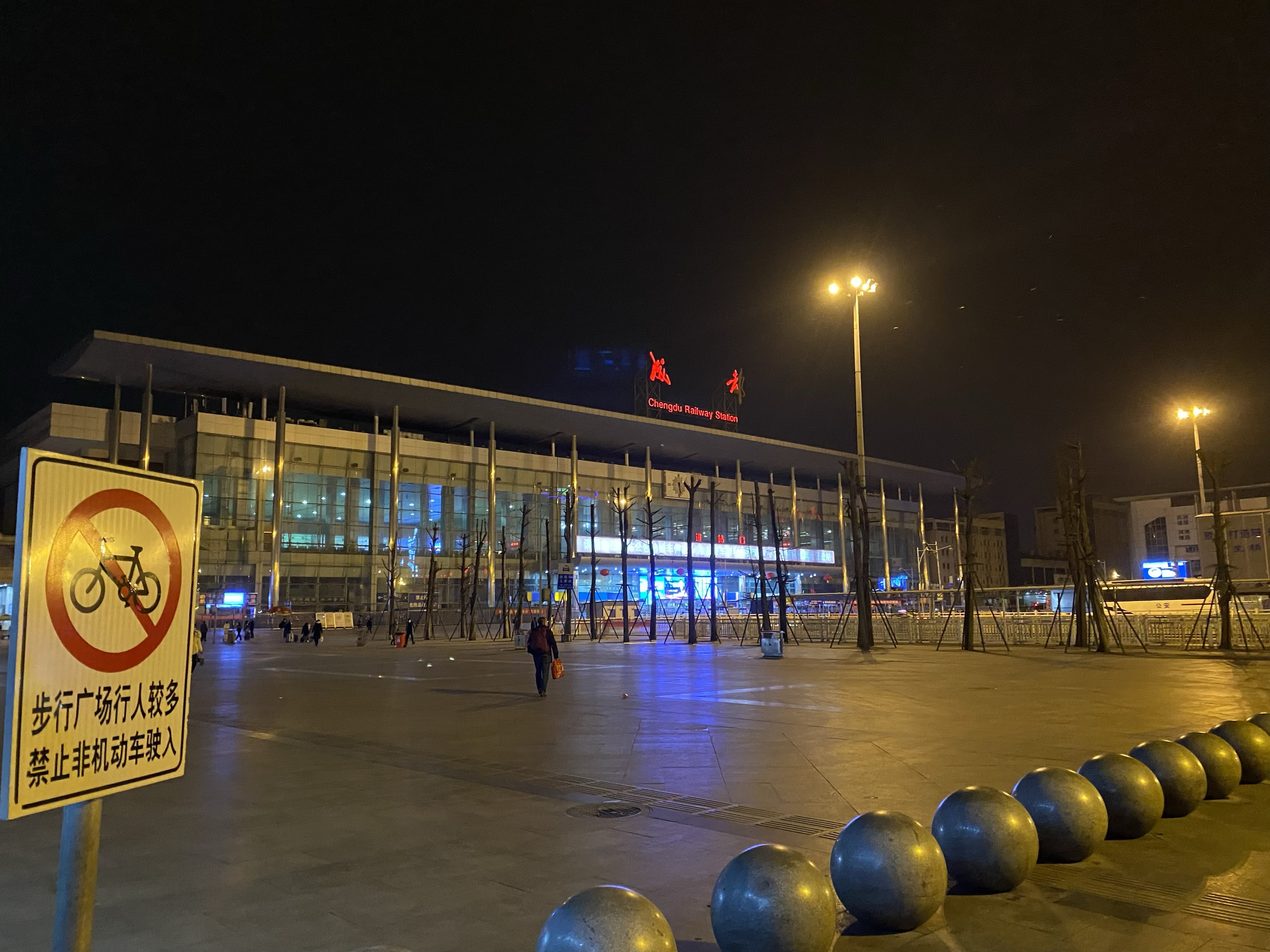 成都火车站南广场